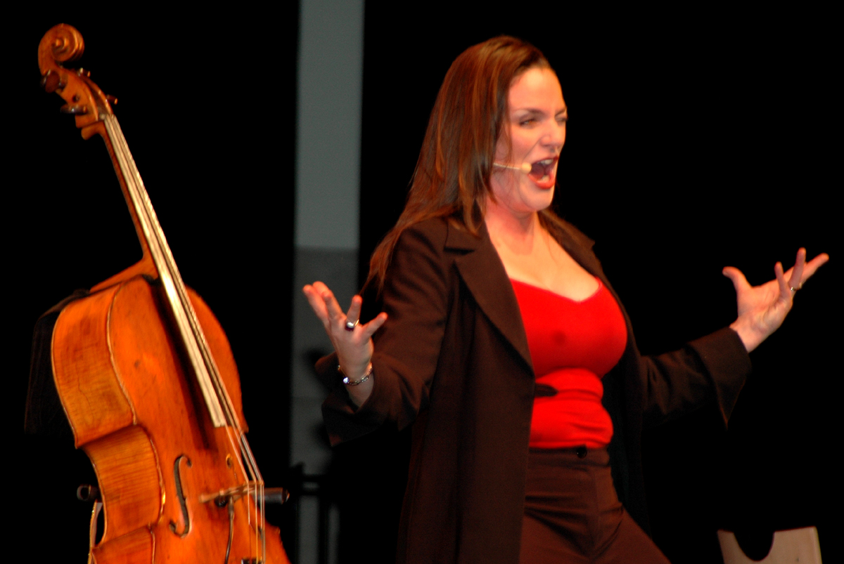 Rebecca at Freiburg-Kulturbörse 2009